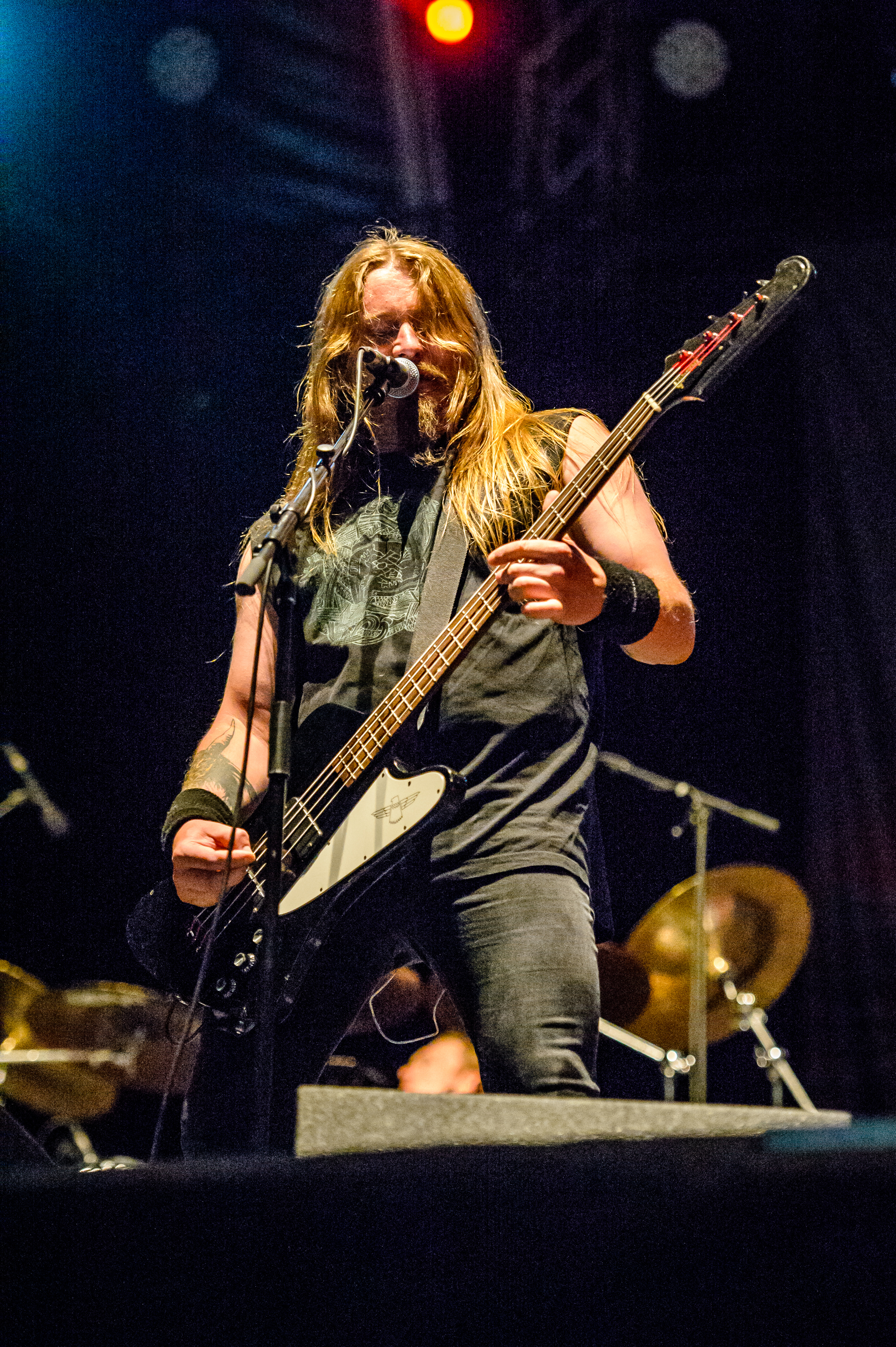 'RockHarz Open Air 2016; Ballenstedt': 'Enslaved'